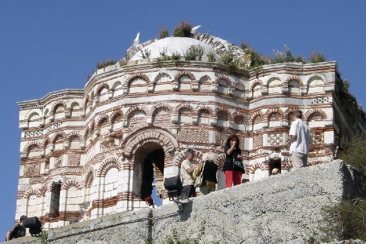 Church of St John Aliturgetos, Несебър, България